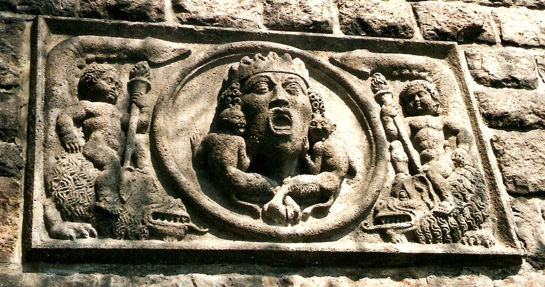 Eins von vier Tascheners Reliefs (Feuer) auf der Lübecker Puppenbrücke